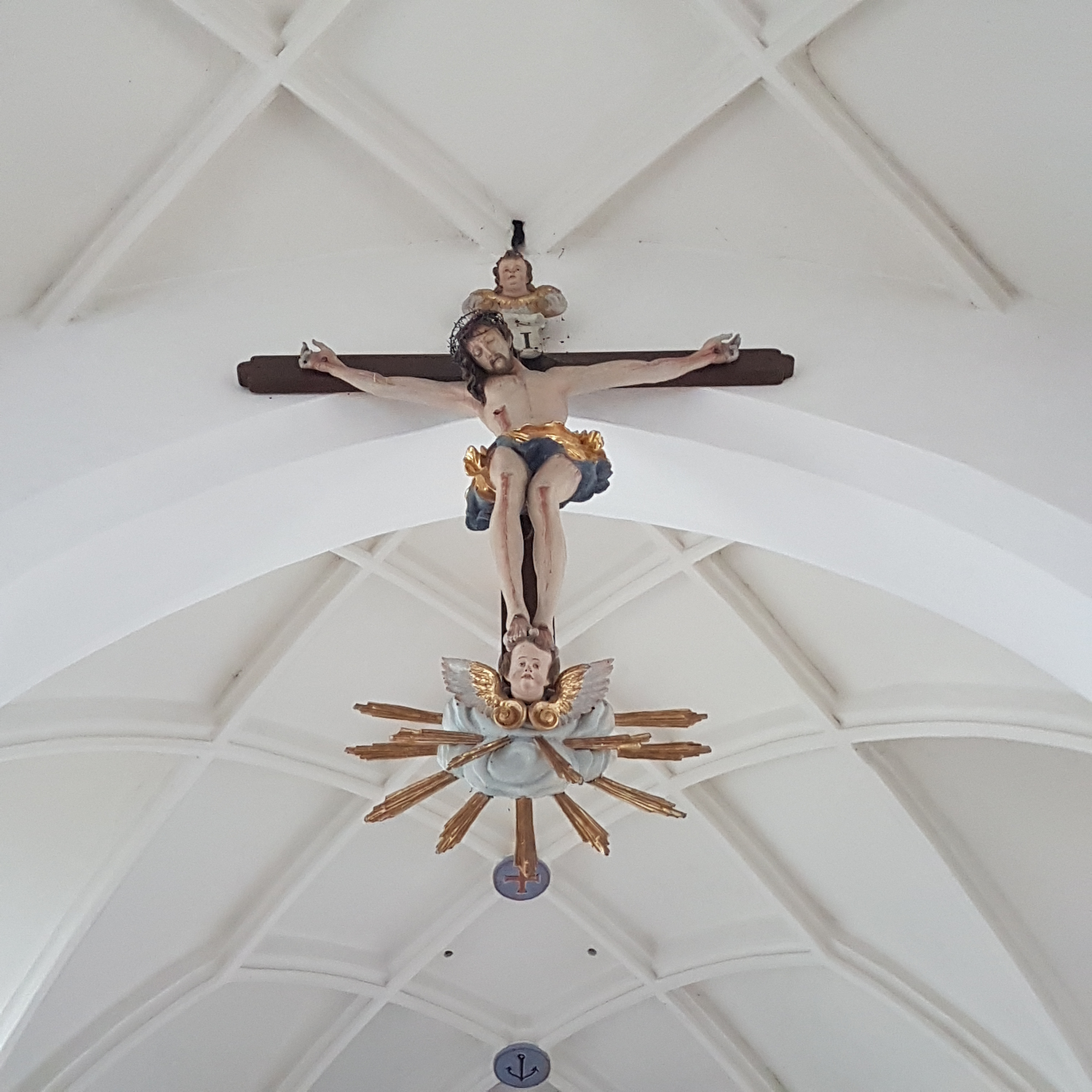 Mühldorf (Petershausen), Wallfahrtskirche St. Ulrich, frühbarockes Chorbogen-Triumphkreuz, das 1713 vom Freisinger Hofbildhauer Franz Anton Mallet mit neuem figürlichen Schmuck ausgestattet wurde.